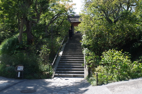 北鎌倉東慶寺山門。